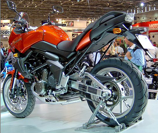 Kawasaki Versys (Modell 2007)